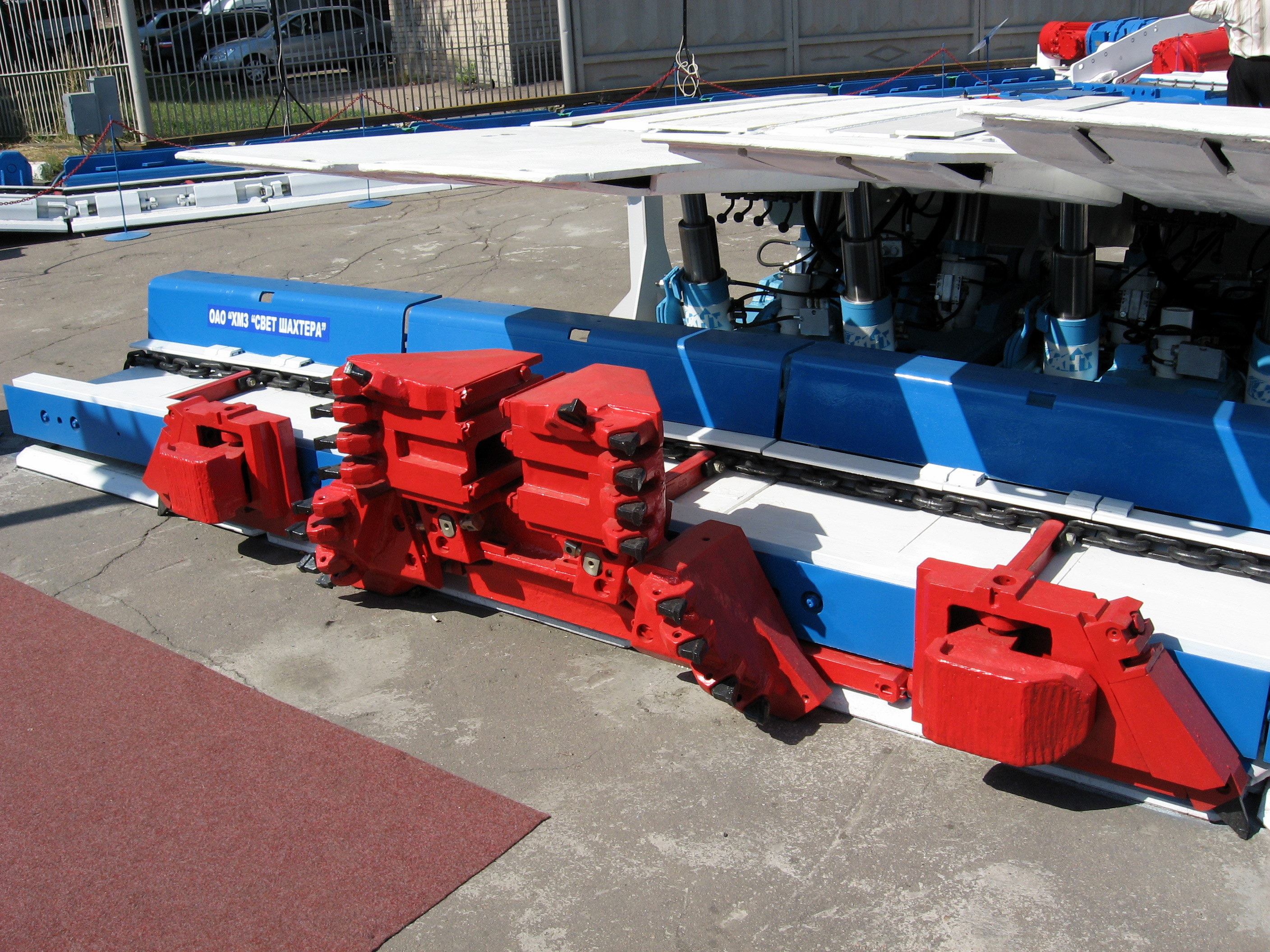 Gleithobel